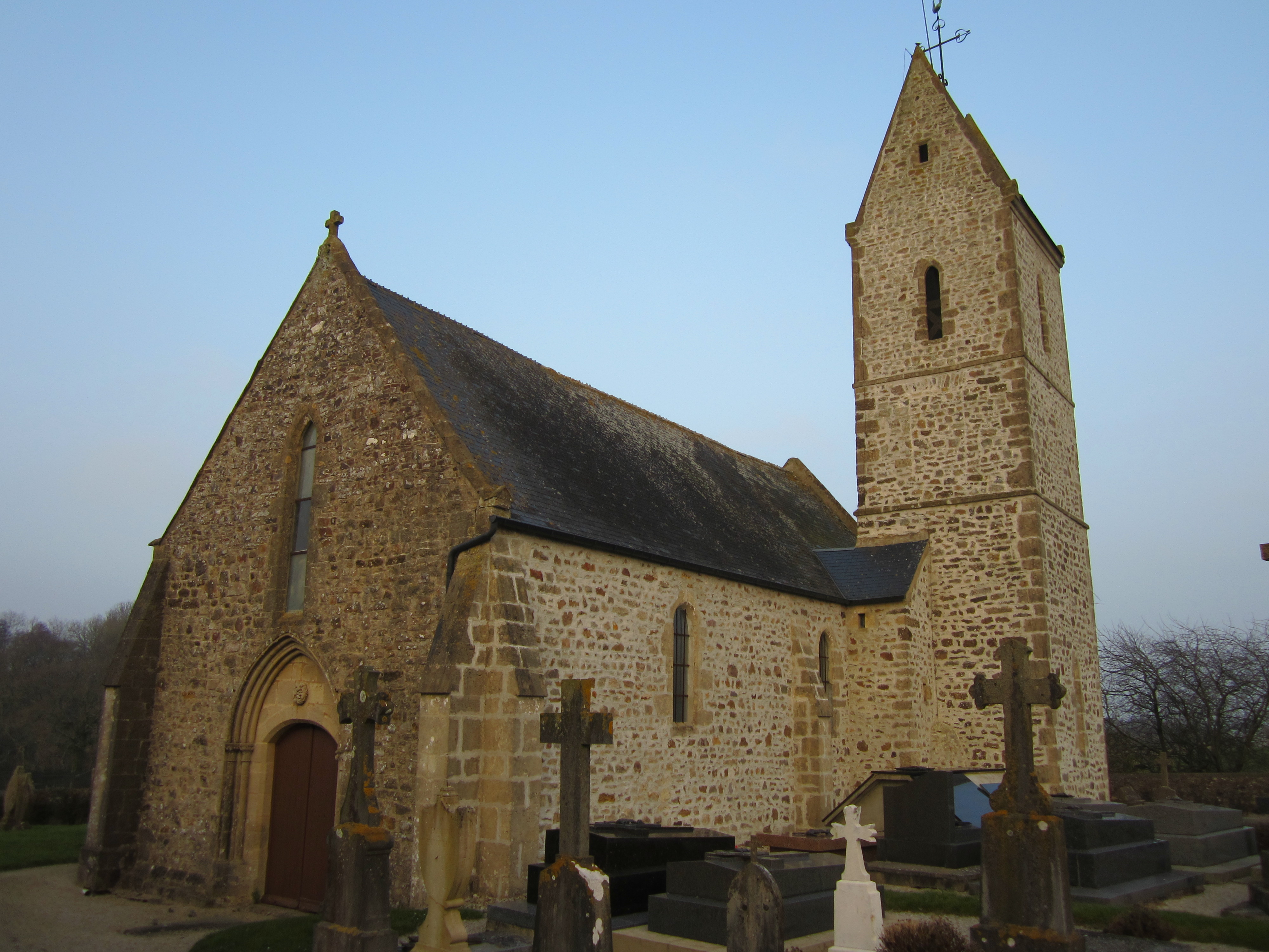 église Saint-Basile de Vaudreville